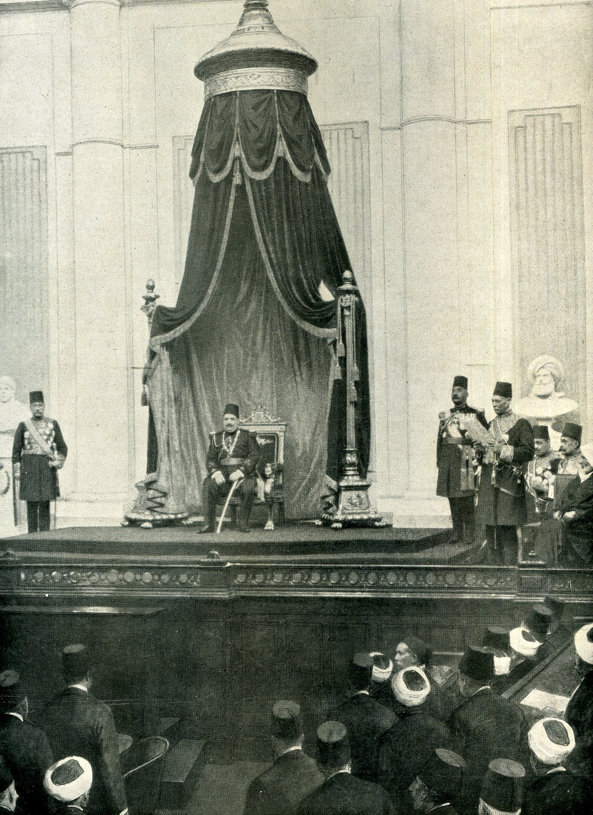 see picture